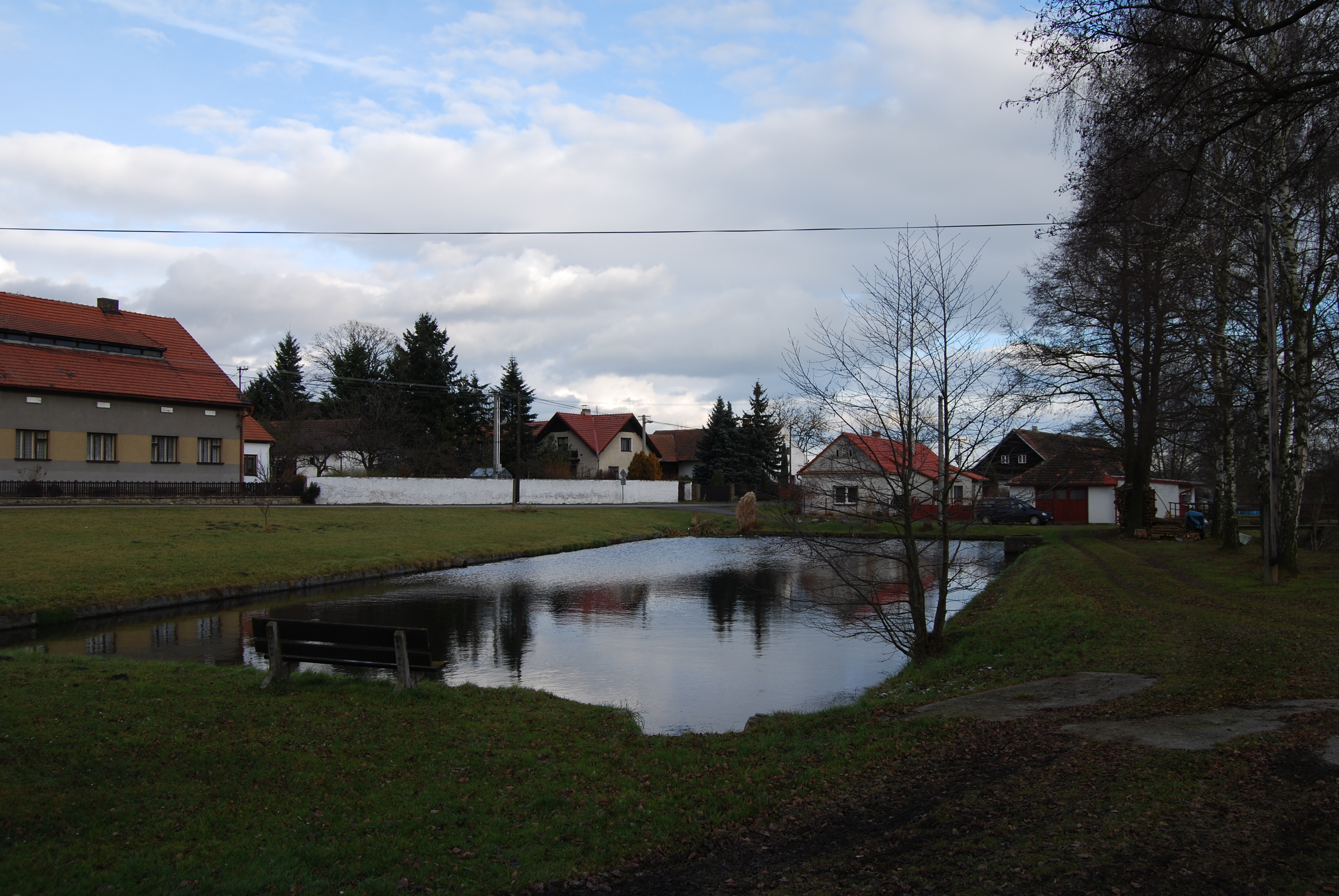 Pohled na náves. Třešně je malá vesnice, část obce Záhoří v okrese Písek. Česká republika.